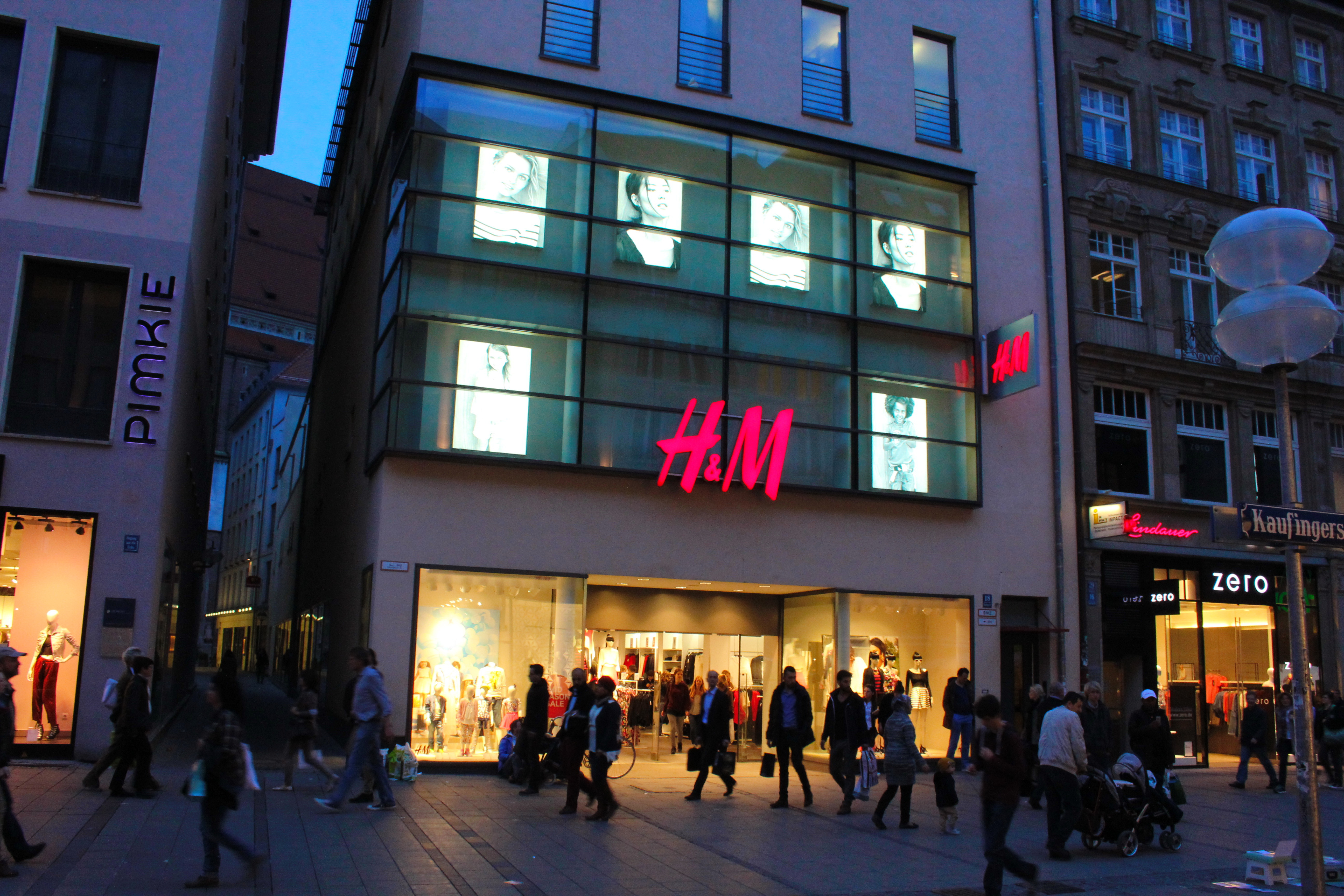 H & M in München in der Kaufingerstraße